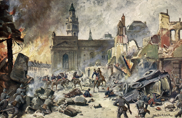 Lille conquise le 13 octobre 1914 par l'armée du général Von Kluck membre du Conseil Supérieur de la guerre. - Gesellschaft m. b. H. Stuttgart - W. Bürger Dimensions : 88 x 138 mm Technique : impression photomécanique N°3435 (carte postale) , série 92.Note manuscrite. - Carte postale représentant un dessin en couleur.